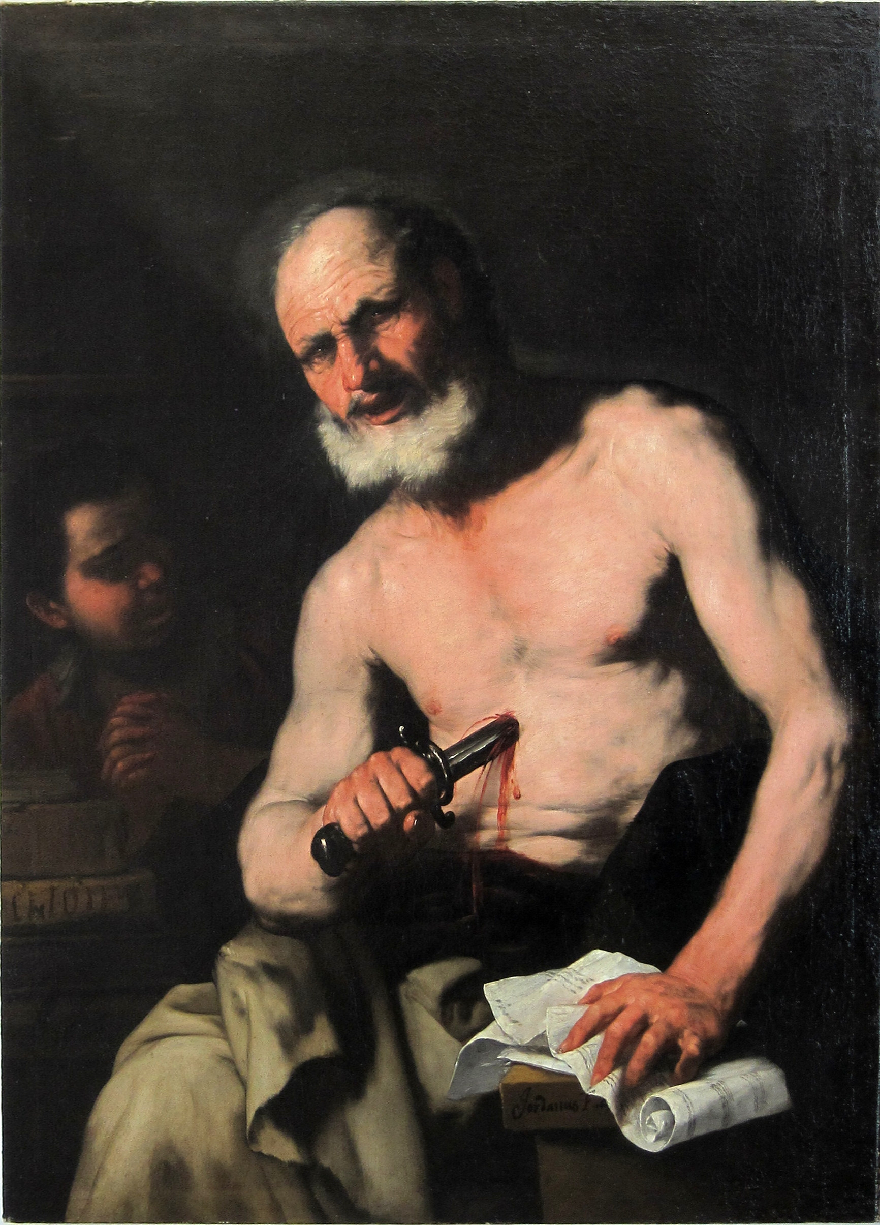 Caton d'Utique au musée des Beaux-Arts André Malraux du Havre.